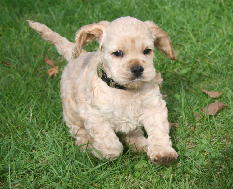 Chiot cocker améicain de 7 semaines